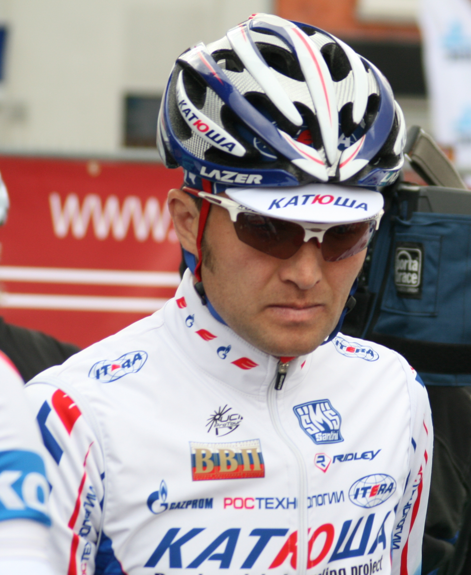 Guennadi Mikhailov, au Grand Prix E3 2009